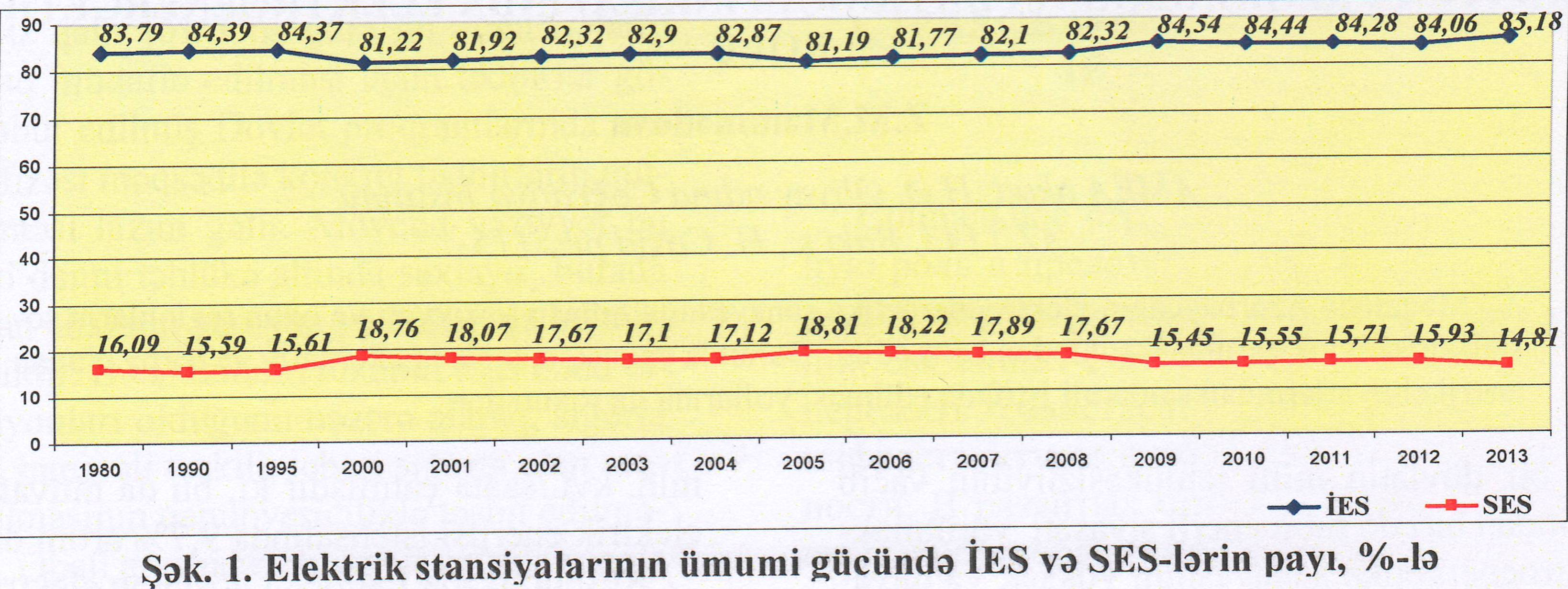 Elektrik stansiyalarının ümumi gücündə İES və SES-lərim payı